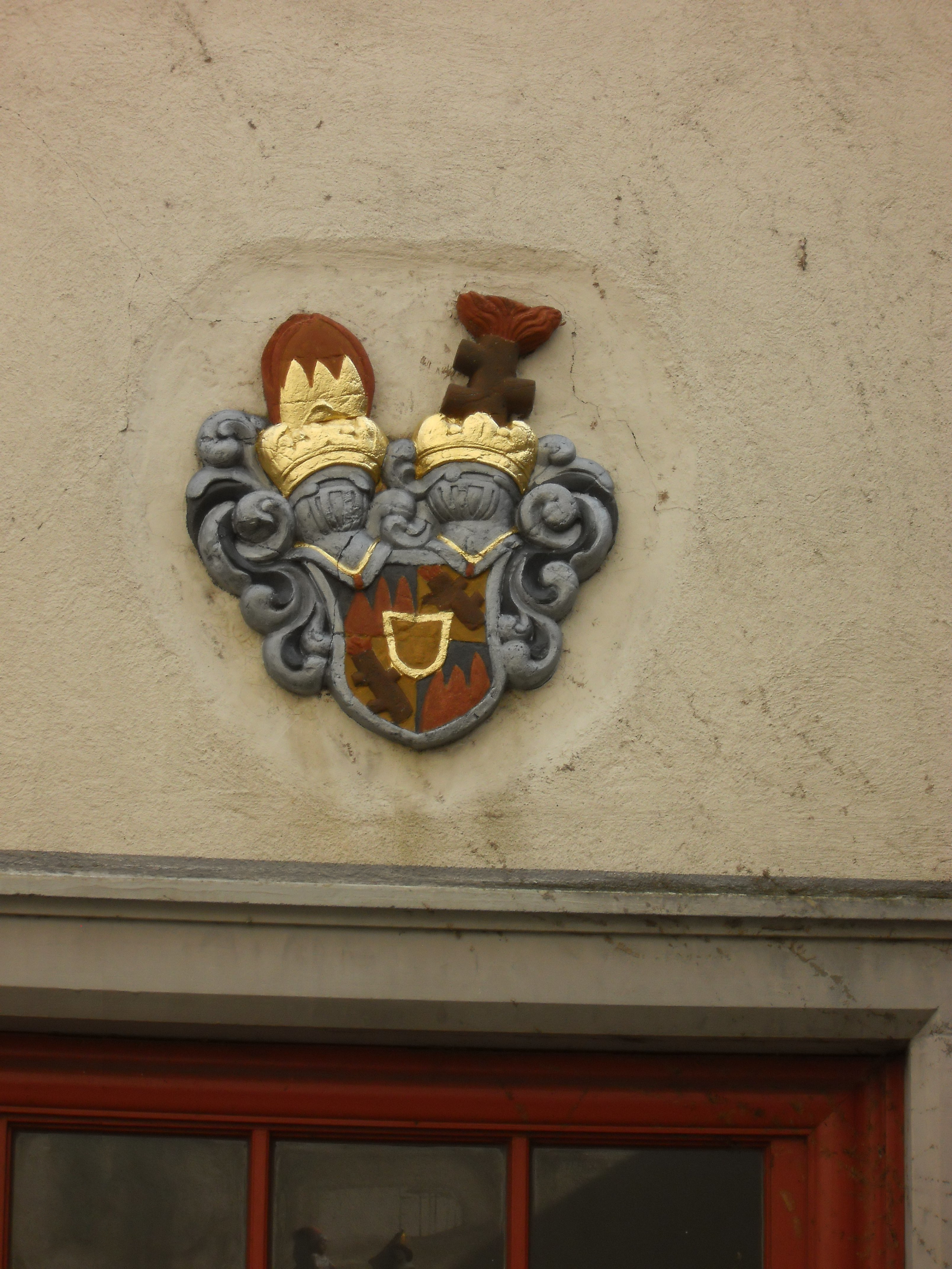 Wappen am Neuen Schloss Tiengen